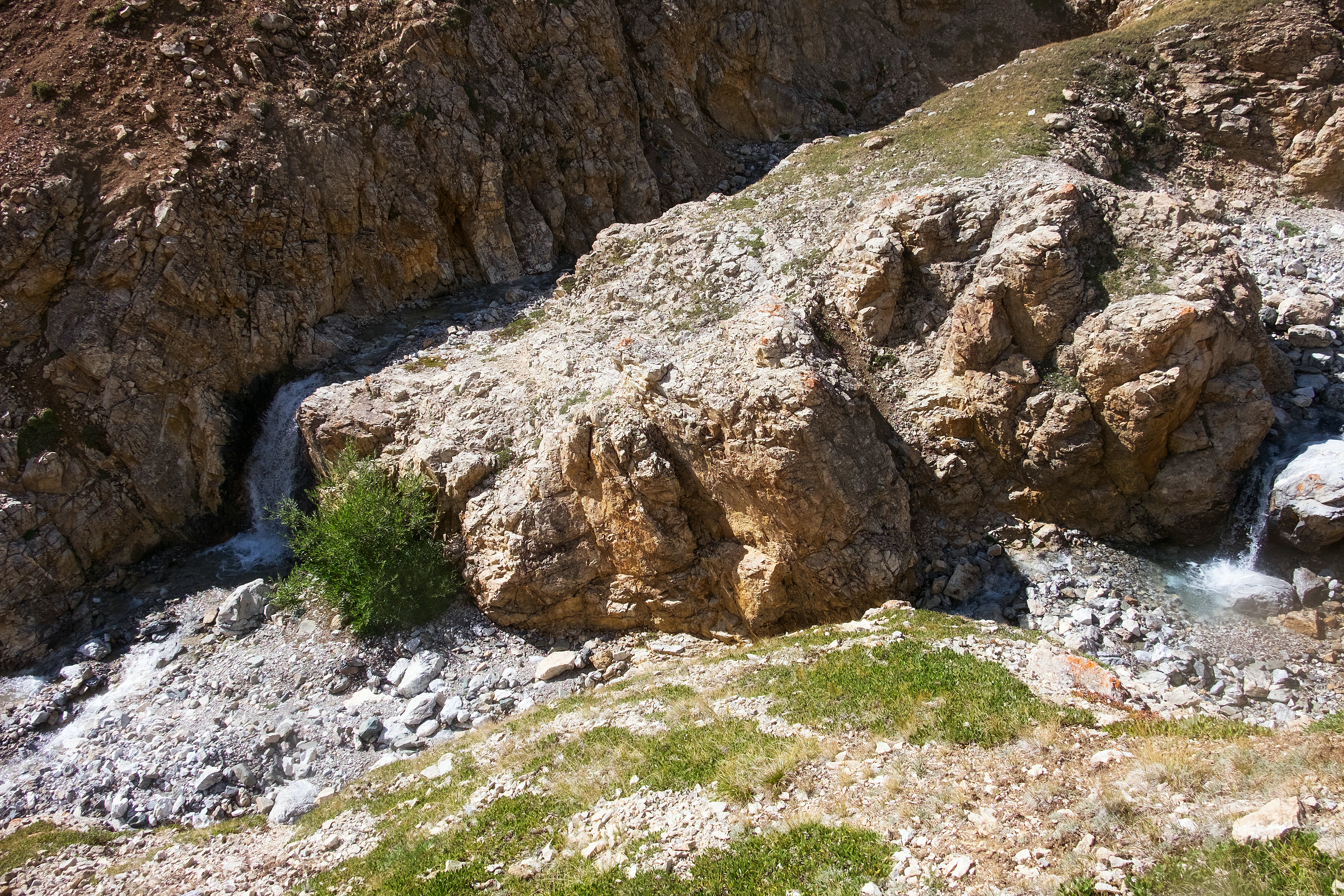 Река Янтерек на Курайском хребте